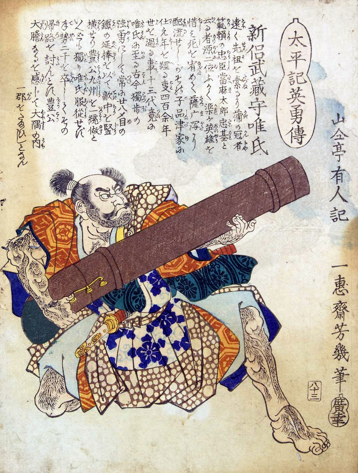 「太平記英勇伝八十三：新侶武蔵守唯氏（新納武蔵守忠元）」